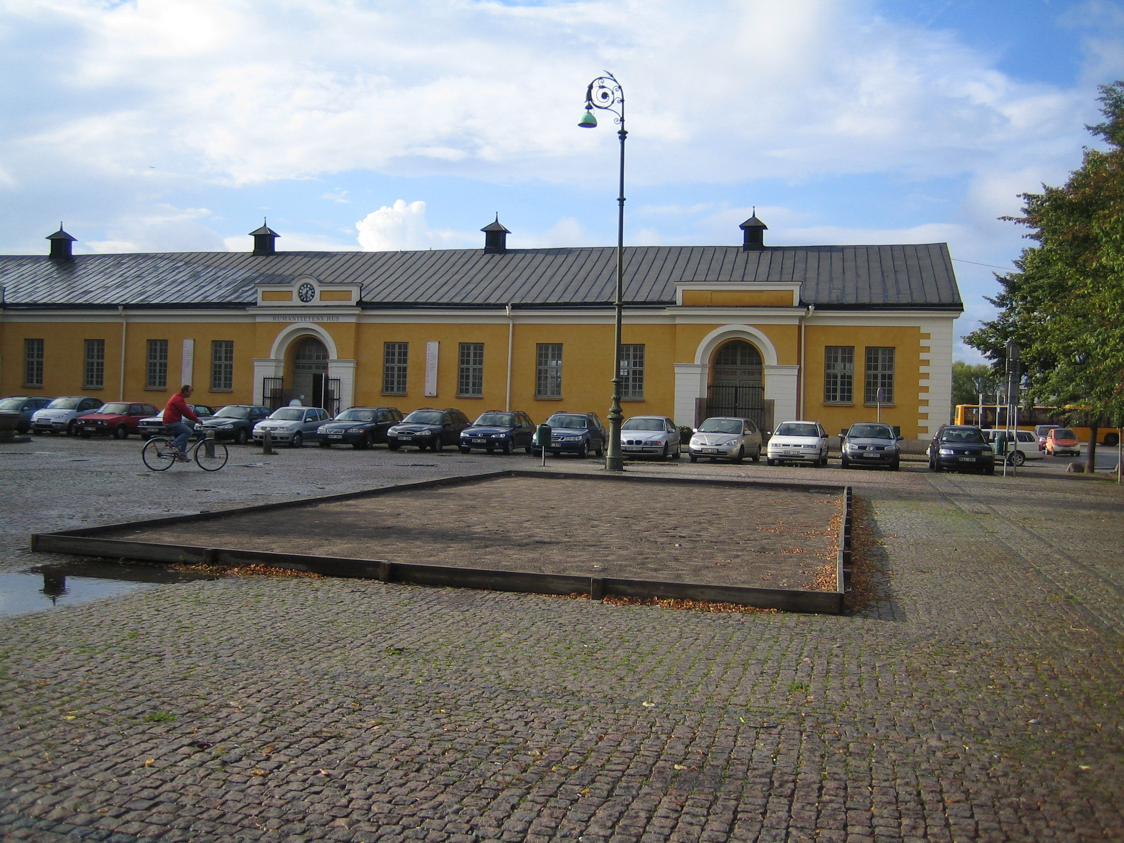 Drottningtorget in Malmö, Sweden.